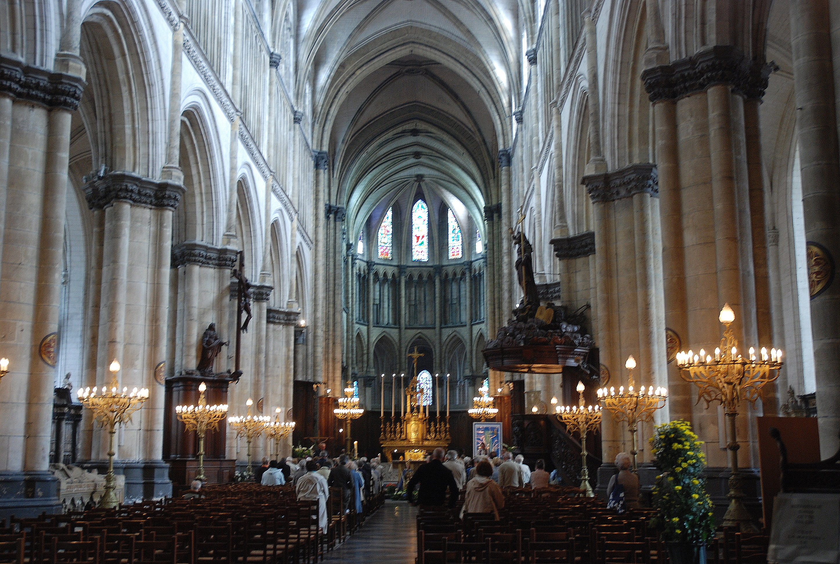 Interieur van de kathedraal van Saint-Omer (Sint-Omaars) in Pas-de-Calais